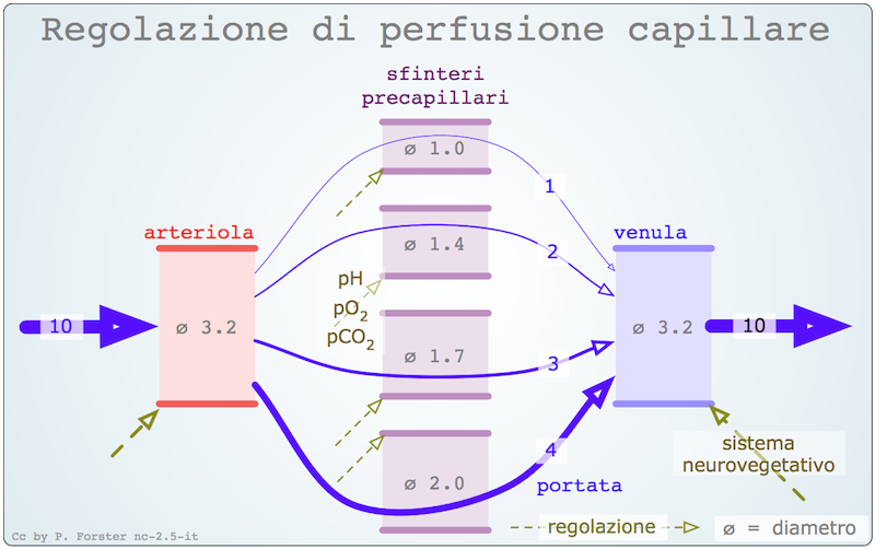 La regolazione della perfusione e della duttilità di capillari avviene maggiormente dai sfinteri precapillari e poi per la dilatazione / costrizione dei capillari covuti a mediatori immunitari.